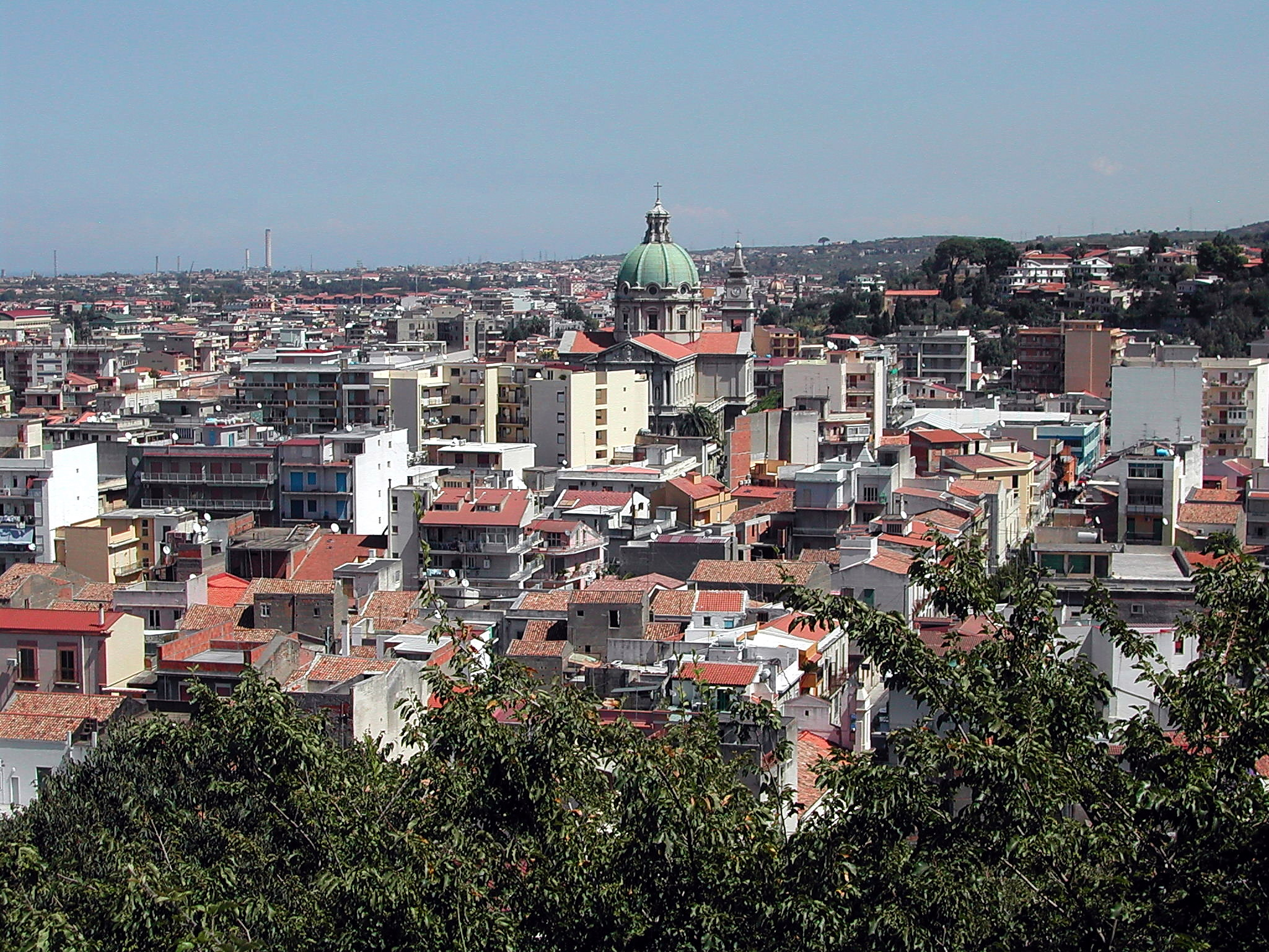 Panorama Barcellona Pozzo di Gotto